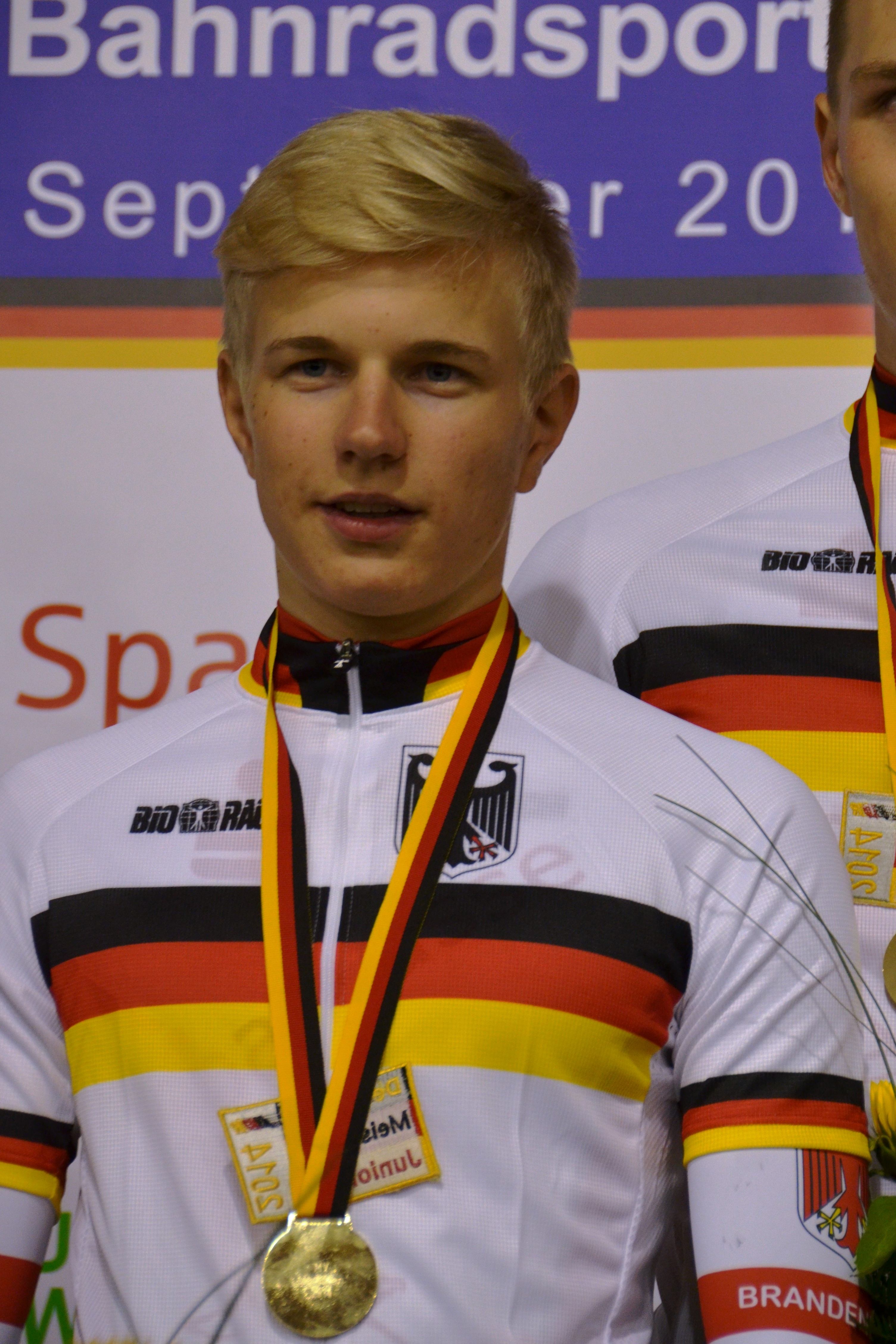 Max Kanter, deutscher Radsportler The making of this document was supported by the Community-Budget of Wikimedia Germany.